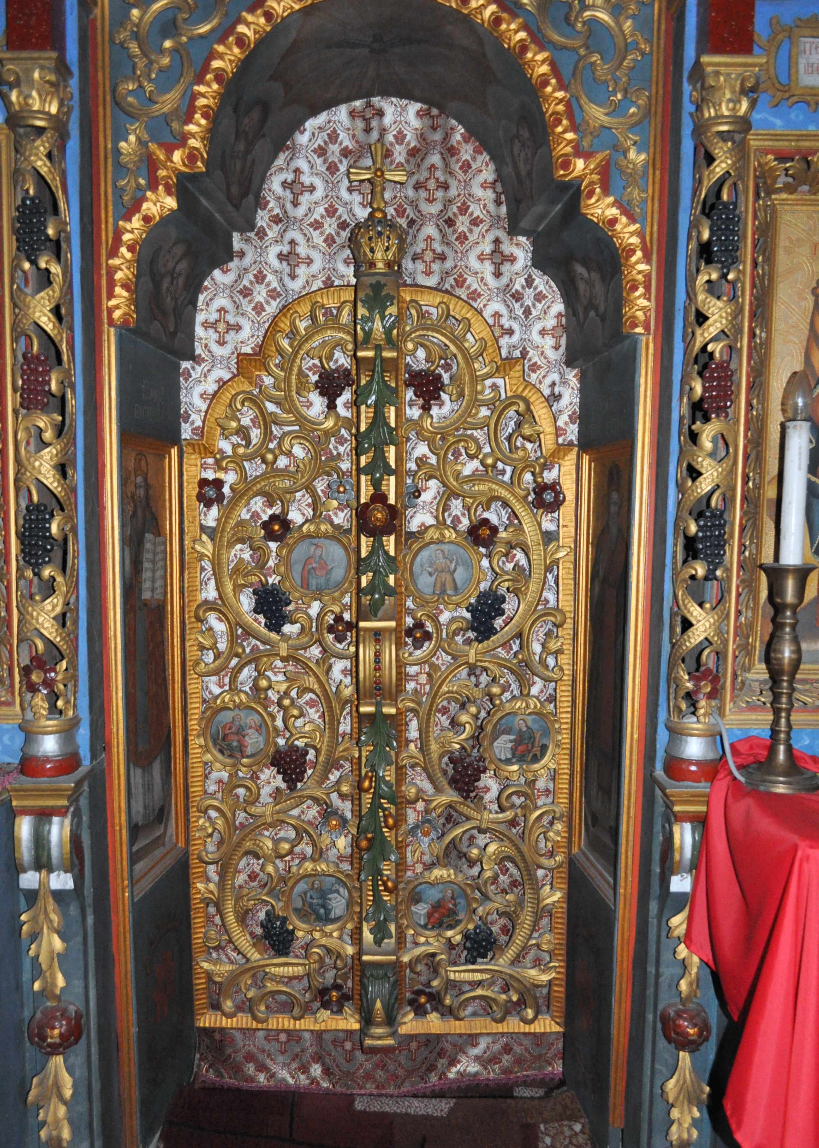 Biserica "Cuvioasa Paraschiva", sat Cetățele; comuna Șișești 01